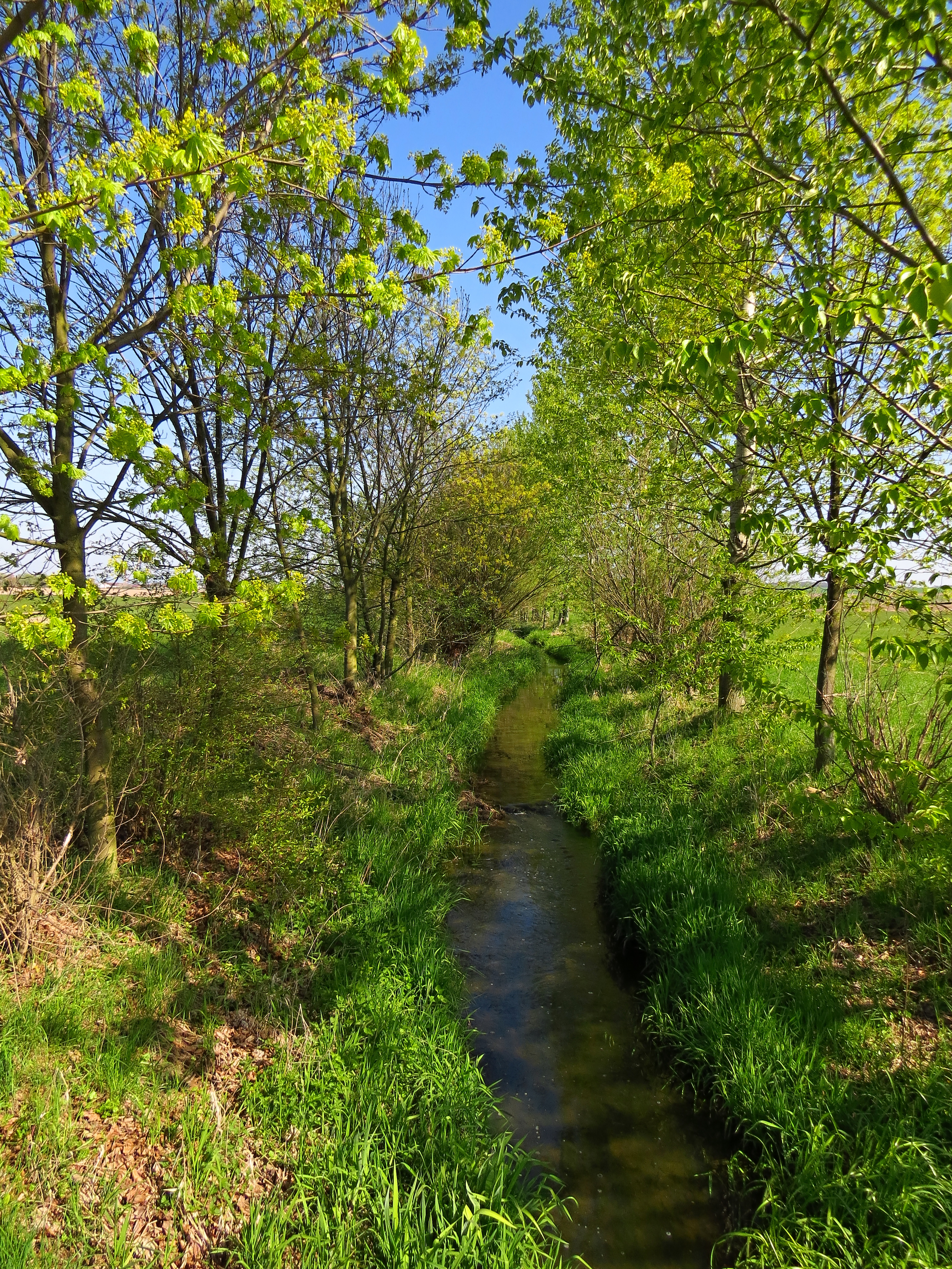 Piletický potok